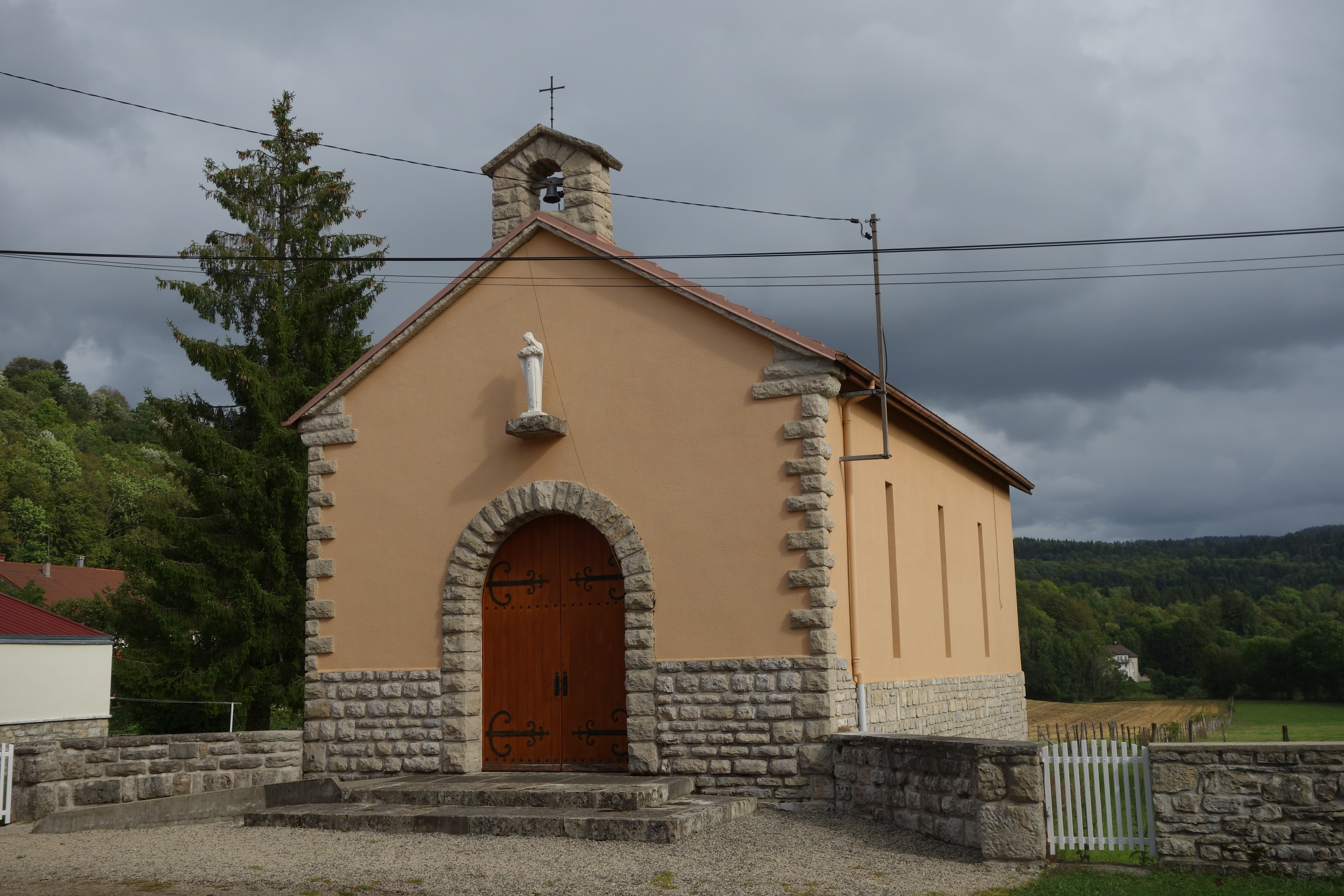 Saugeot - chapelle - Jura